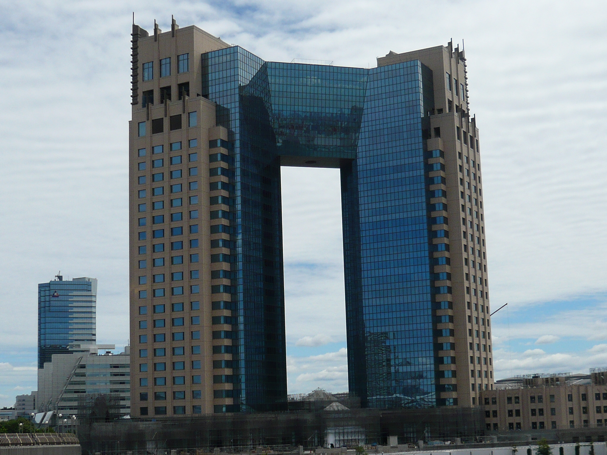 東京ベイコート倶楽部ホテル&スパリゾート（東京都江東区有明） Tokyo Baycourt Club(東京ベイコート倶楽部ホテル&スパリゾート) in Koto-ku,Tokyo,Japan.